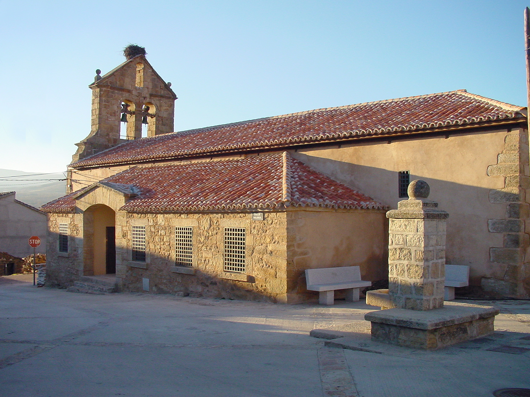 Iglesia de Sta. Ana en Madarcos.